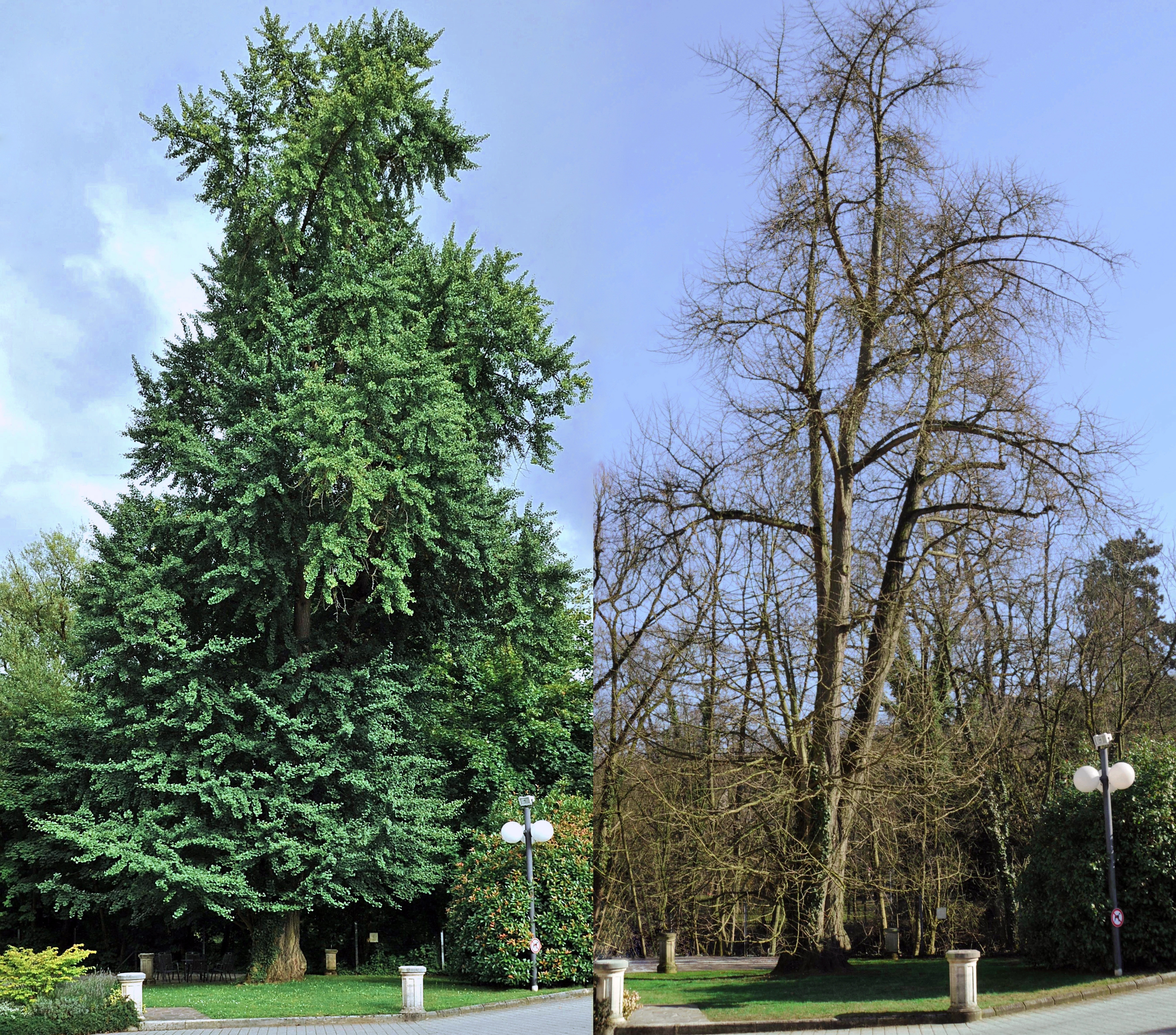 Ginkgo biloba in 7-15 Place François-Joseph Dargent, 1413 Luxemburg / Die Geographische Koordinaten sind (WGS84): 49.627294°, 6.130306°